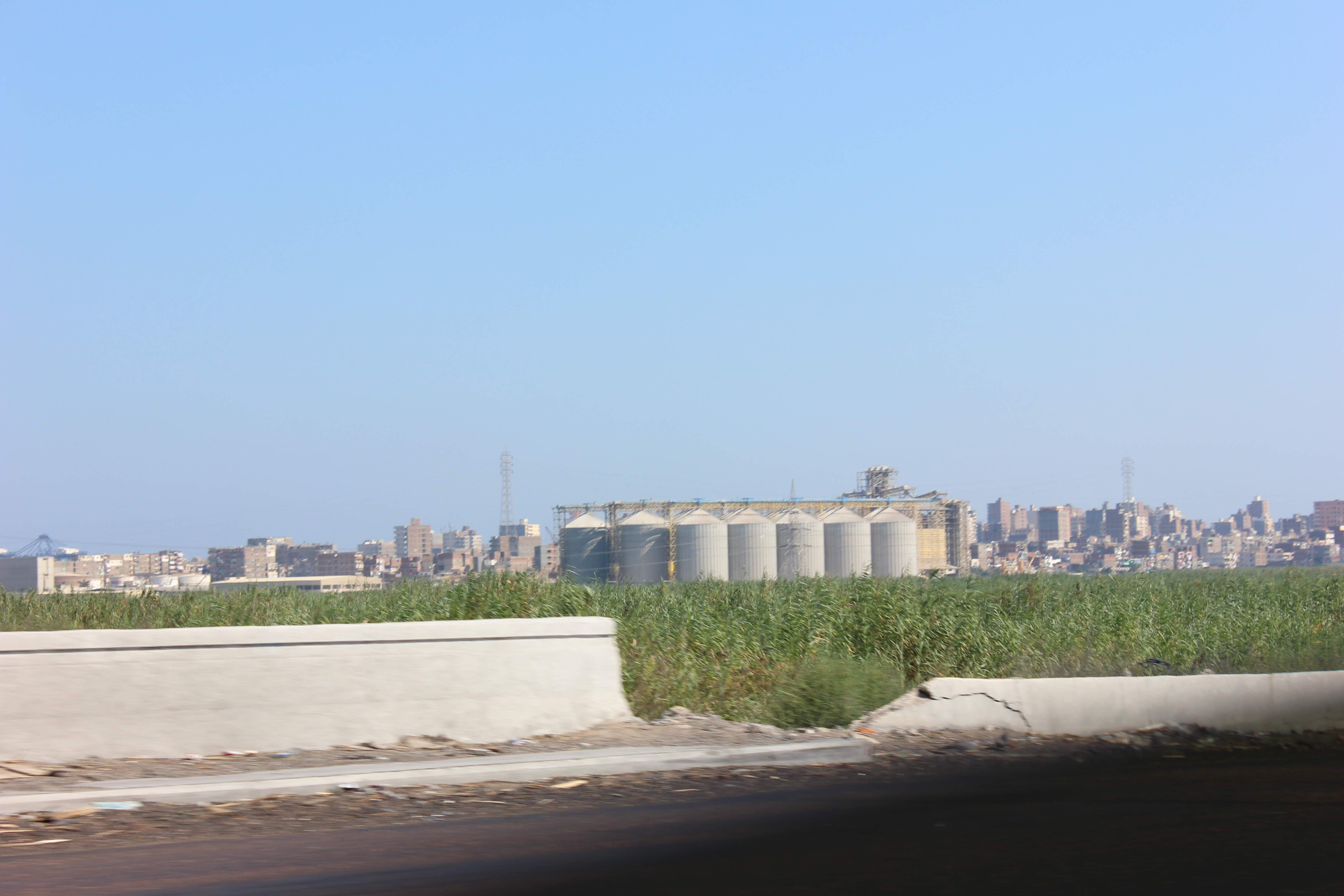 الطريق الدولي الساحلي بالإسكندرية.